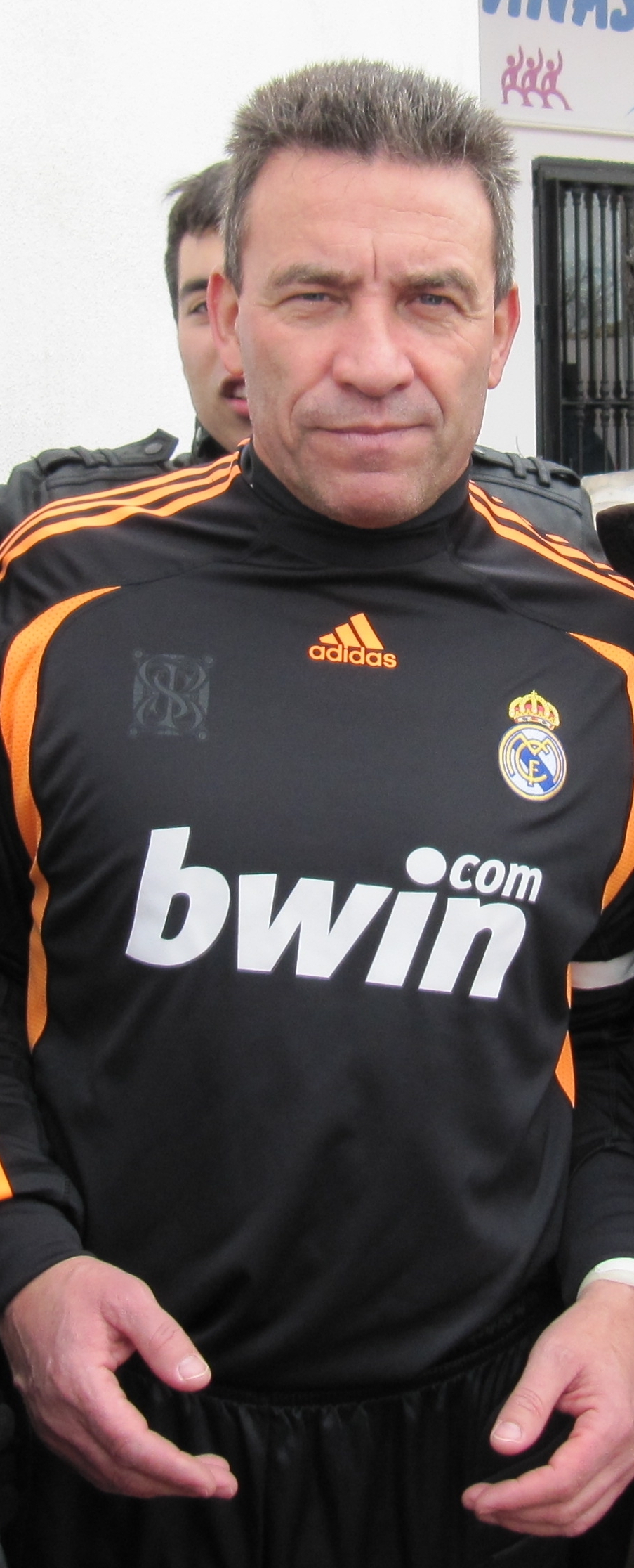 Francisco Buyo. Betanzos (La Coruña), 13 de enero de 1958.